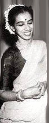 Bailarina clásica.